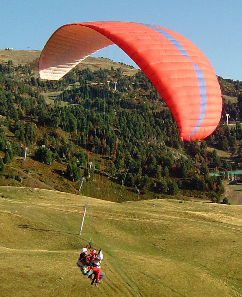 Parapente biplace en vol a Chamrousse Source : photographie personnelle prise par l'utilisateur Simon-Pierre en 2004. Aile : Ozone - Cosmic Rider